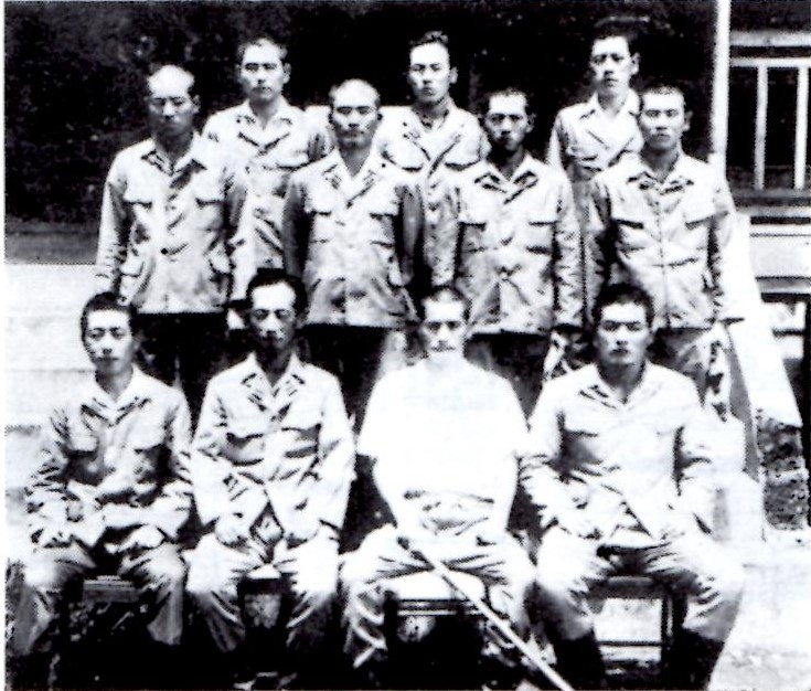 1944年10月、第153海軍航空隊 戦闘901飛行隊のフィリピン・マニラ・ニコラスフィールド基地での記念撮影